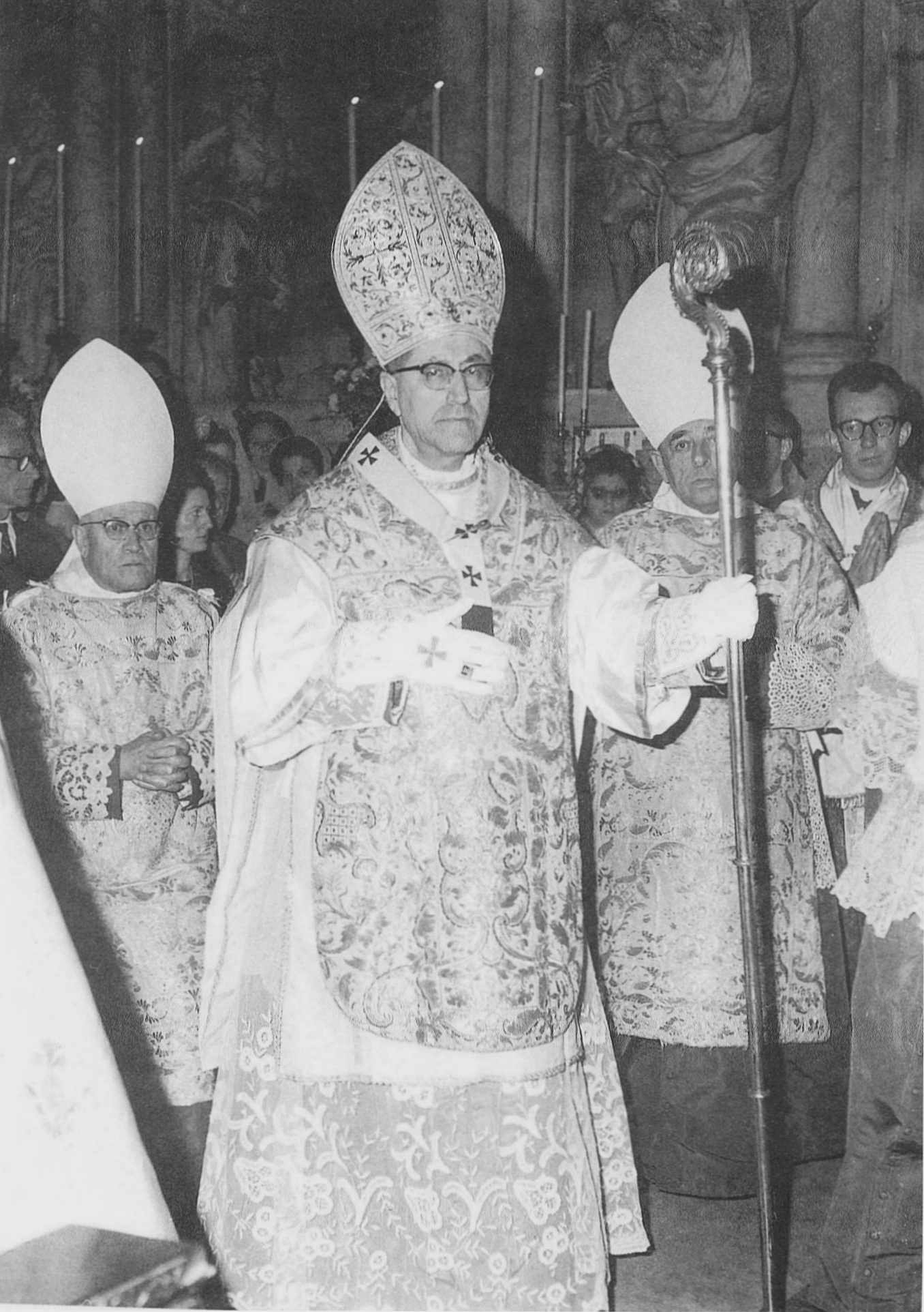 Il Cardinale Arcivescovo di Genova Giuseppe Siri durante la messa per la canonizzazione di San Francesco Maria da Camporosso.